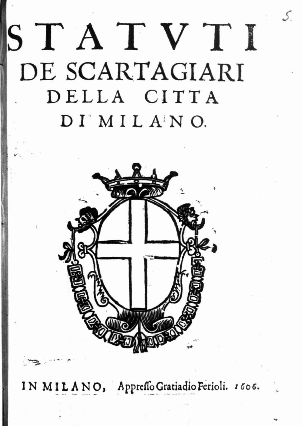 Frontespizio